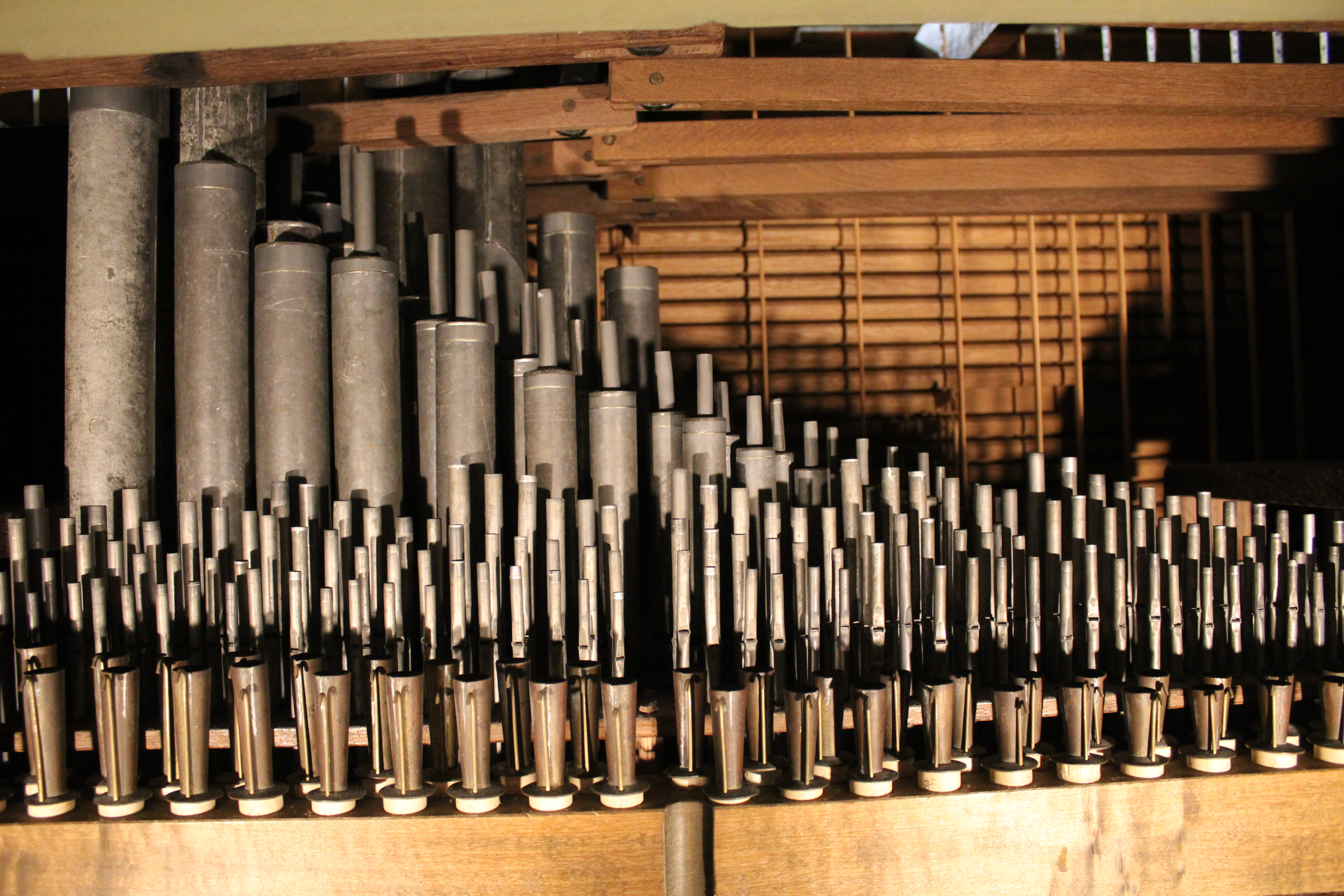 Orgel der St.-Jacobi-Kkirche Lüdingworth, Cuxhaven, Niedersachsen, Deutschland